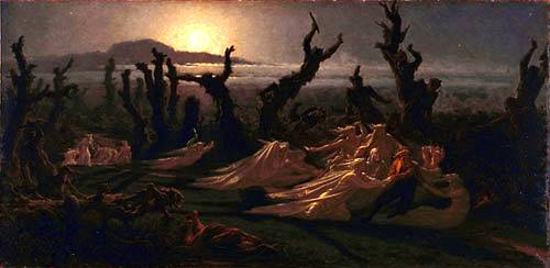 Yan' Dargent, Les Lavandières de la nuit, 1861, huile sur toile, 75 x 150 cm. Musée des beaux-arts de Quimper, France. Les kannerezed-noz (en breton, "lavandières de la nuit" en français), ces femmes blanches battaient le linge des morts au clair de lune en punition de leurs péchés, invitaient les voyageurs attardés à tordre les draps pour les enchaîner à leur propre damnation (conte collecté par Émile Souvestre en 1845 dans la région de l'estuaire de la Penzé)